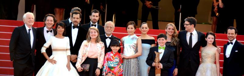 L'équipe du fillm "Le Petit prince" au festival de Cannes